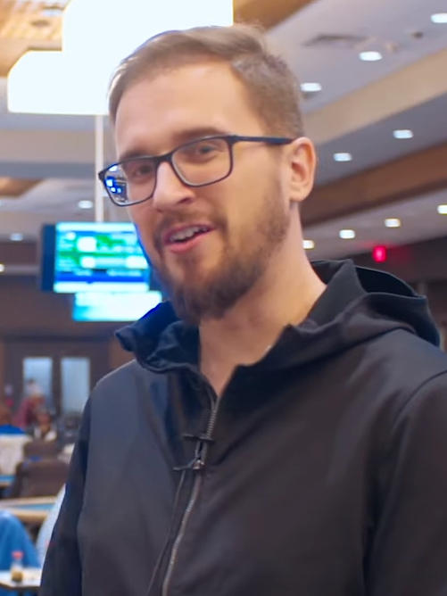 Julien Martini bei der WPT Gardens Poker Championship